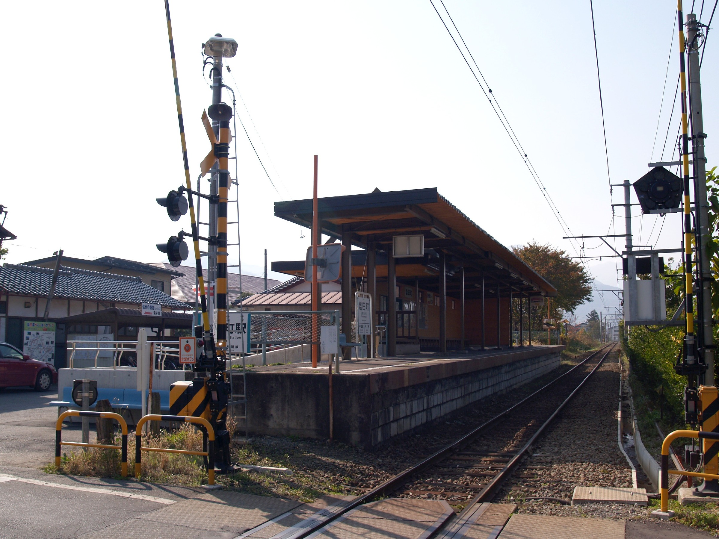 塩田町駅ホーム